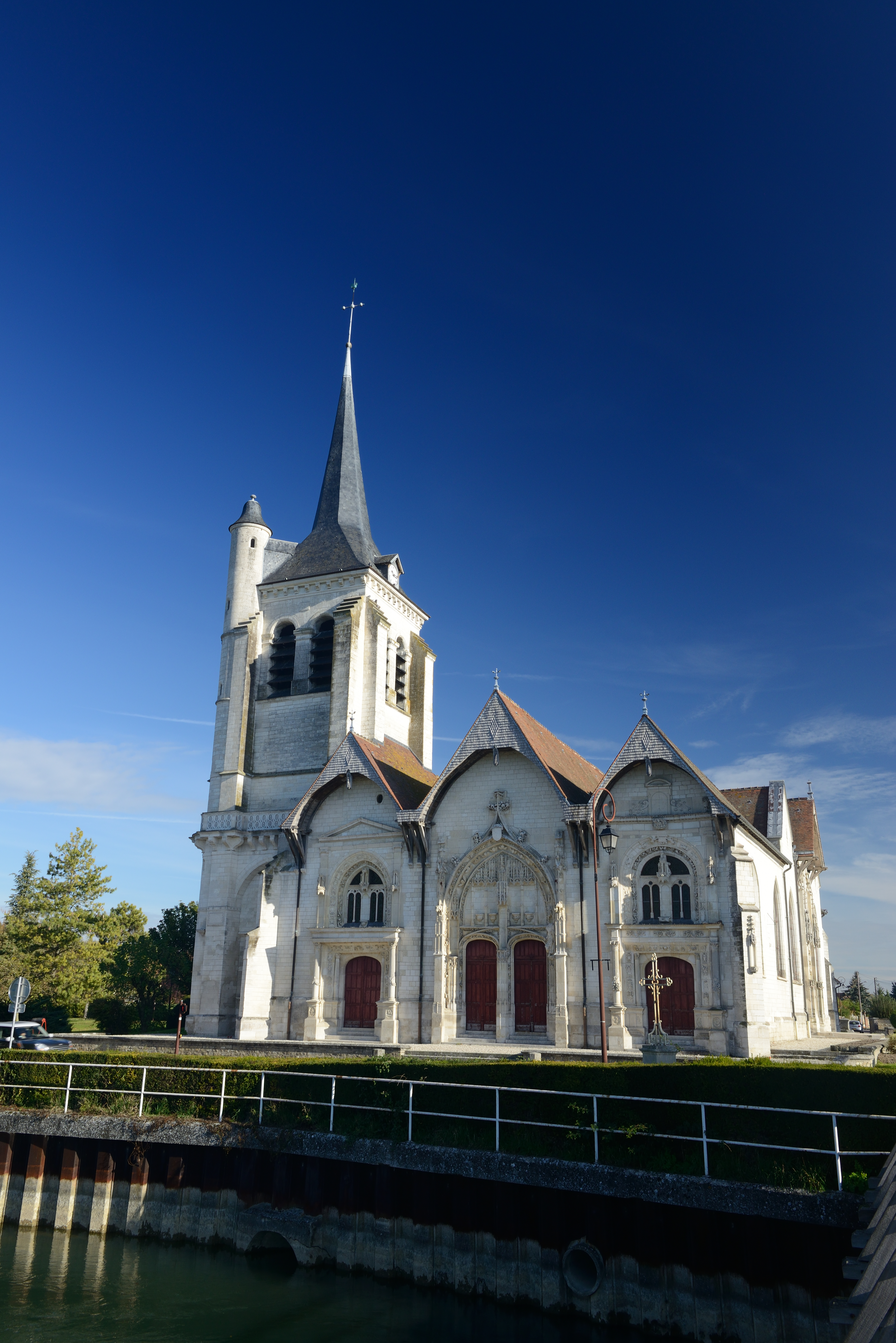 Eglise Notre Dame de l assomption